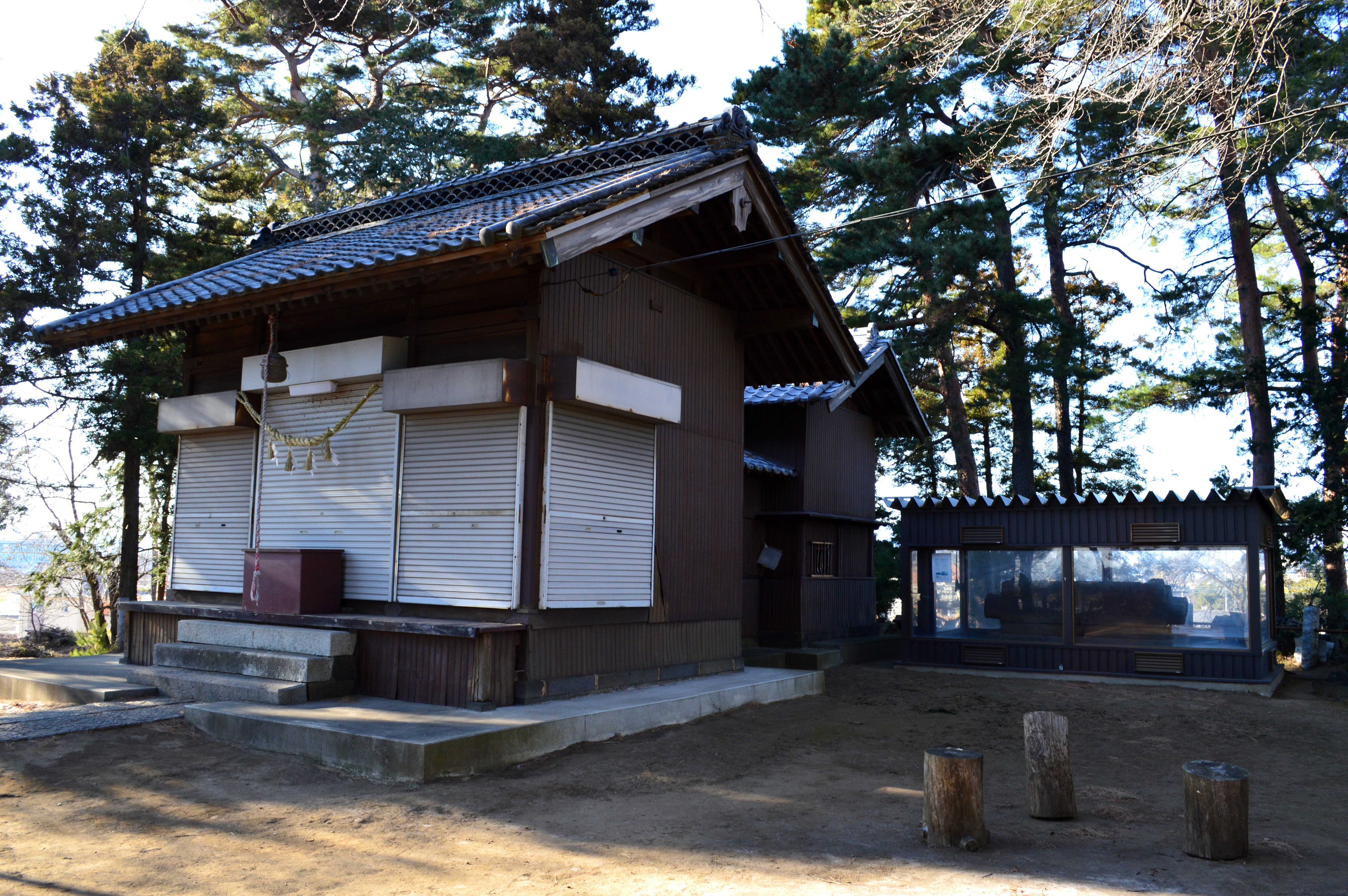 お富士山古墳 後円部墳頂